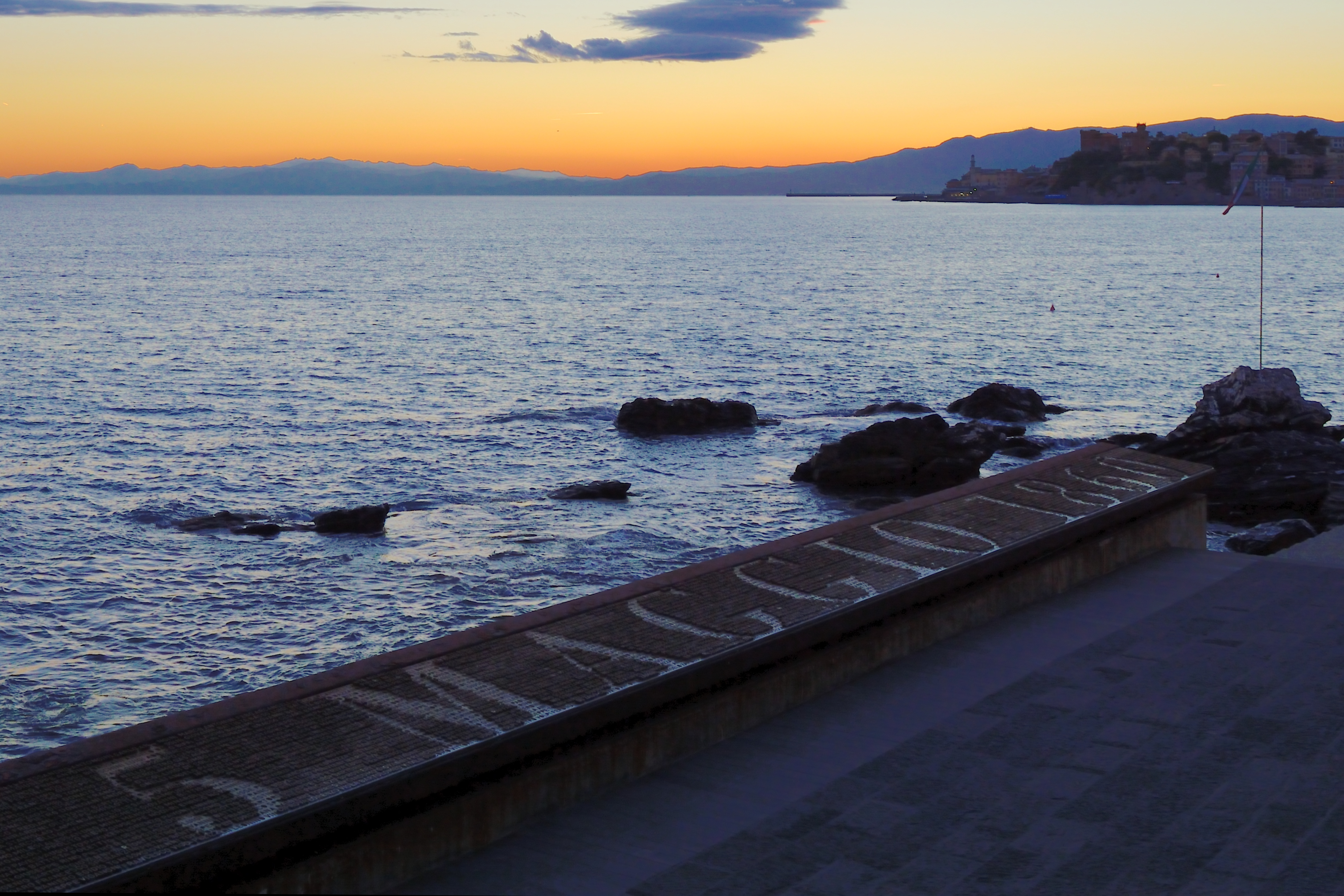 Monumento ai Mille This is a photo of a monument which is part of cultural heritage of Italy.